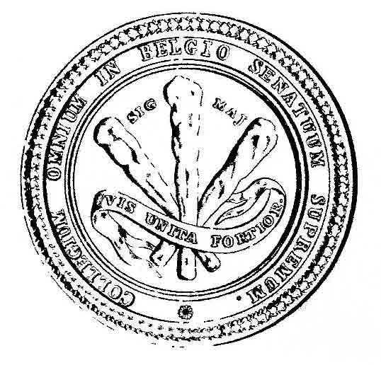 Sigillum Maior Collegium Omnium in Belgio Senatuum Supremum